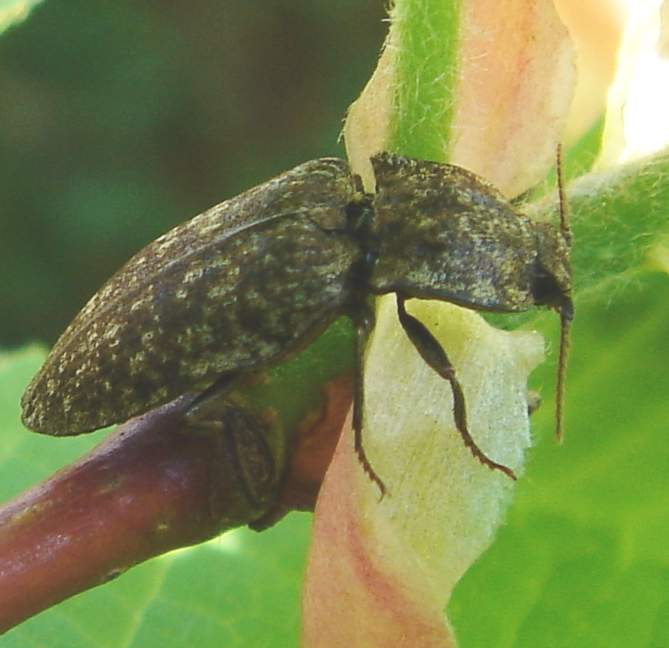 Schnellkäfer der auf einem Ast sitzt.